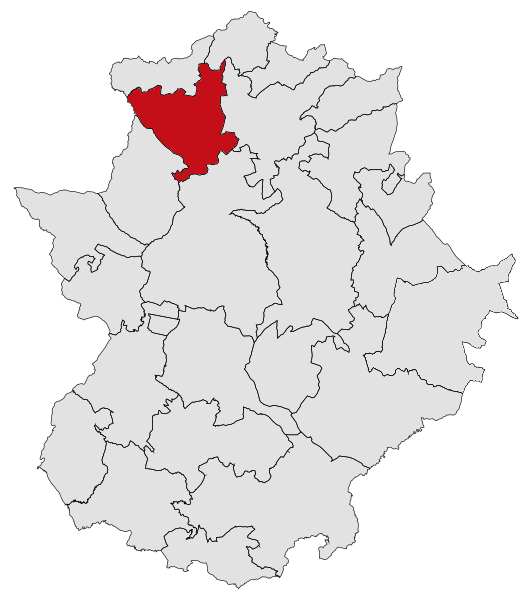 Localización del Valle del Alagón respecto a Extremadura